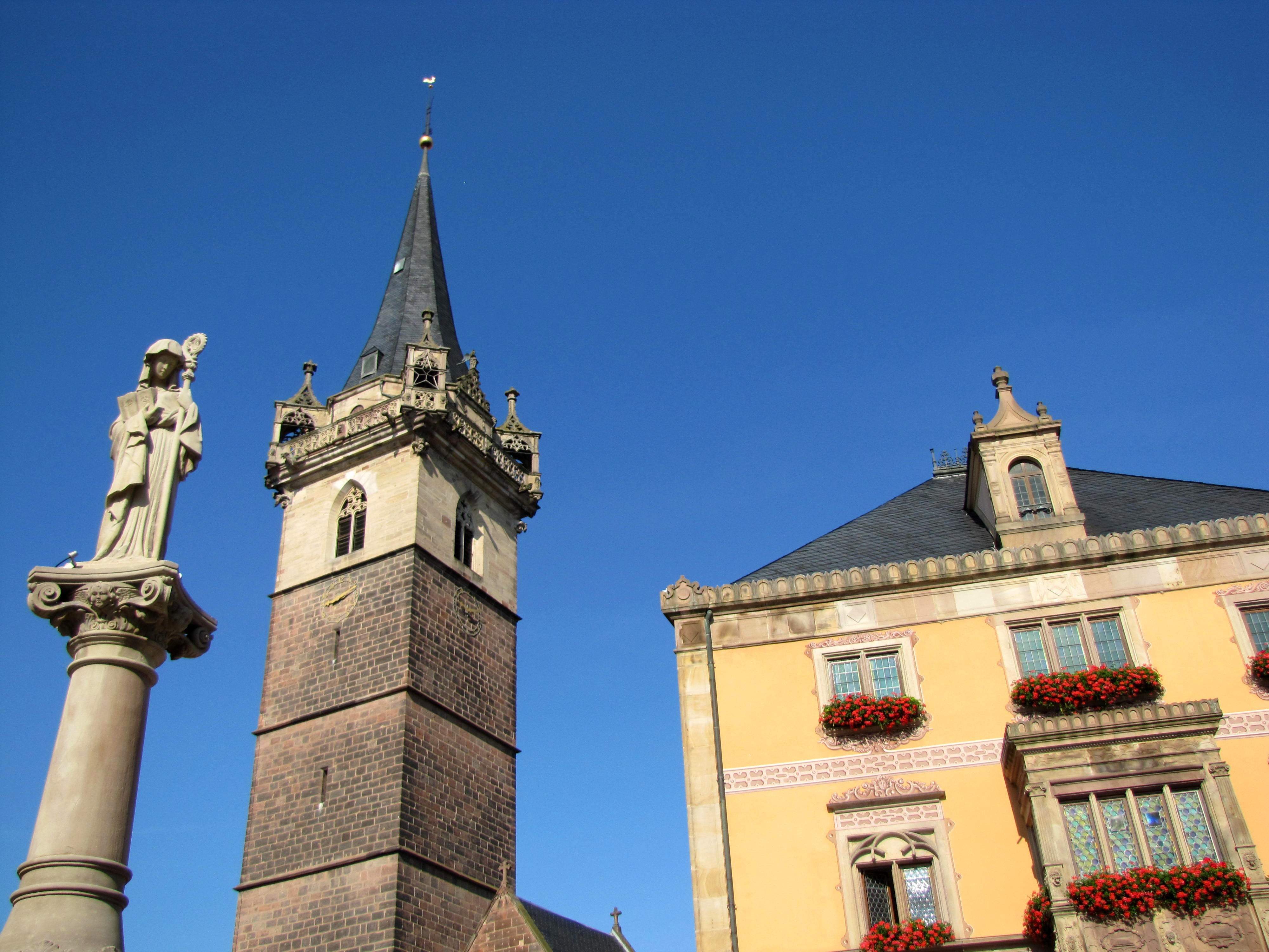 Alsace, Bas-Rhin, Obernai, Ancienne chapelle Notre-Dame (XIIIe-XVe-XVIe), dite "Kappelturm" (PA00084846, IA00023935). Hôtel de ville (XVe-XVIe-XVIIe-XIXe) (PA00084853, IA00023940). Fontaine Sainte-Odile (1893)